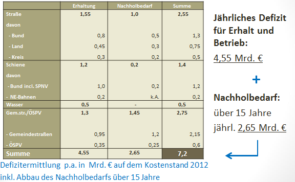 Defizitermittlung der Daehre Kommission